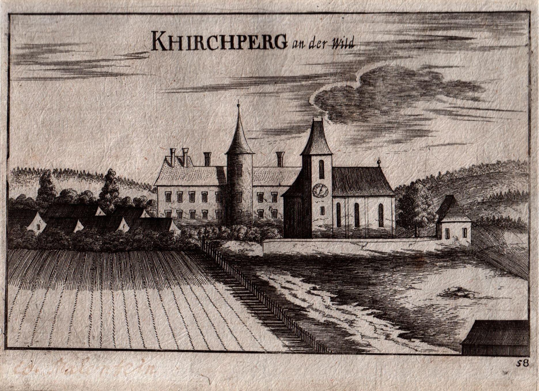 Kirchberg an der Wild - Kupferstichdruck Zeichner C.M.Fischer aus dem Jahre 1672